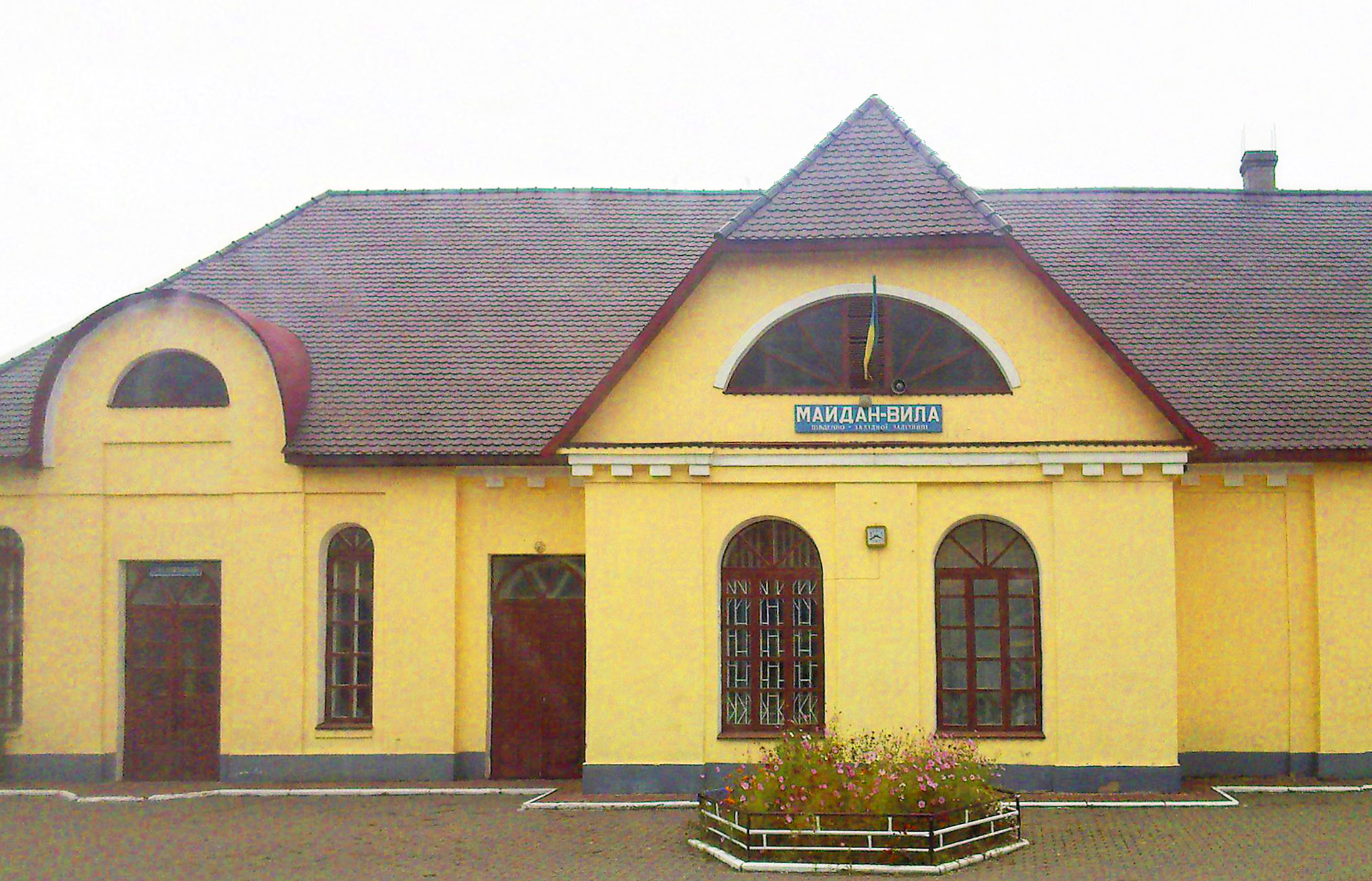 станція Майдан-Вила